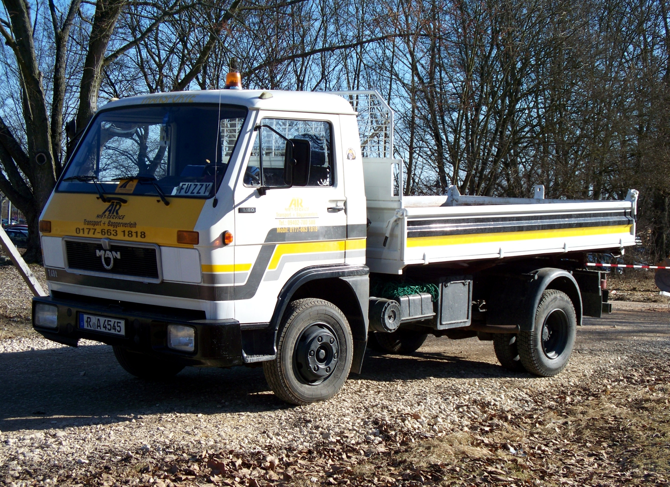 Ein MAN 8.150 G90 LKW in Regensburg, 2011.